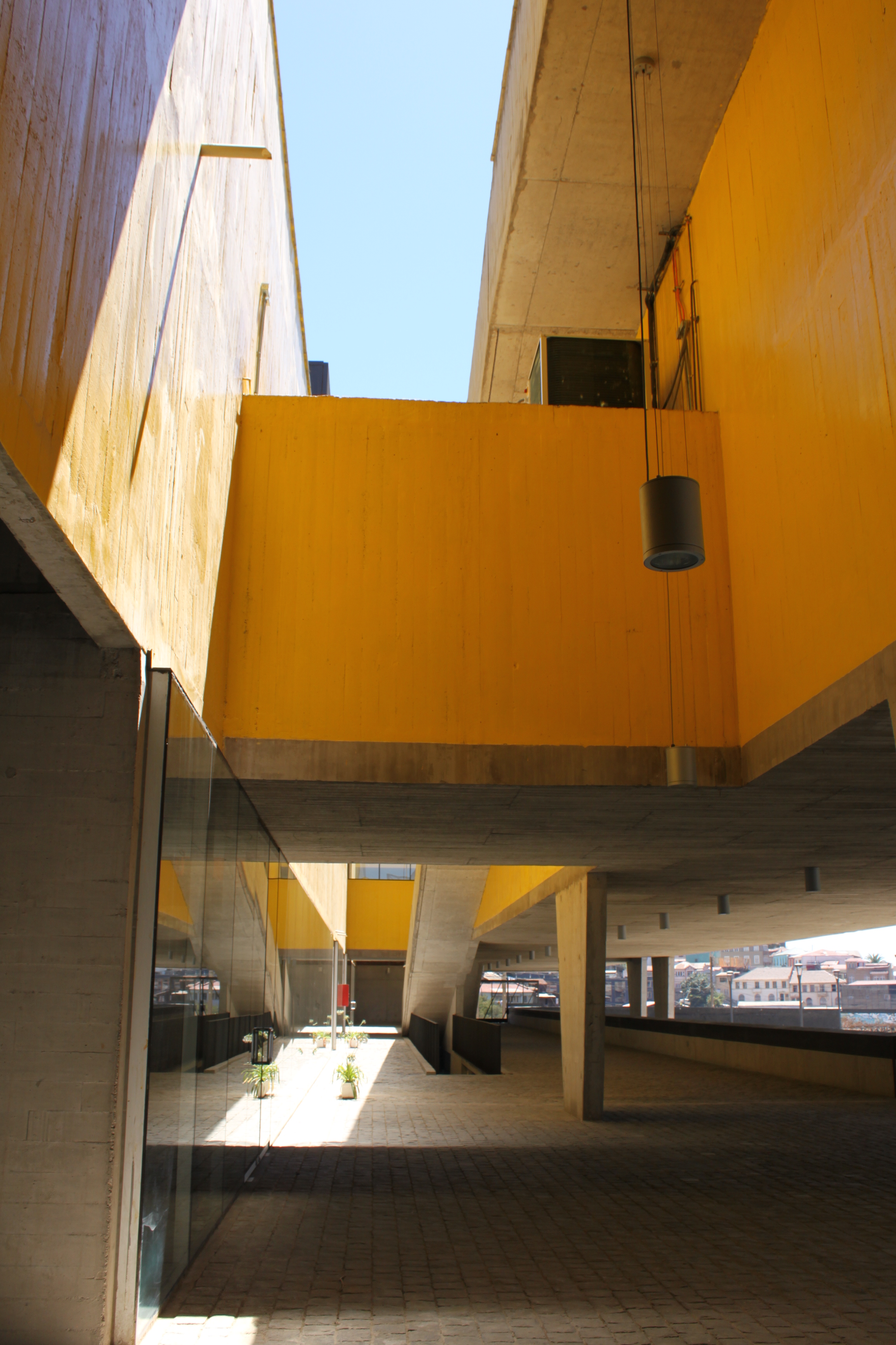 Vista edificio Centro Cultural Parque Cultural Valparaíso, Chile.